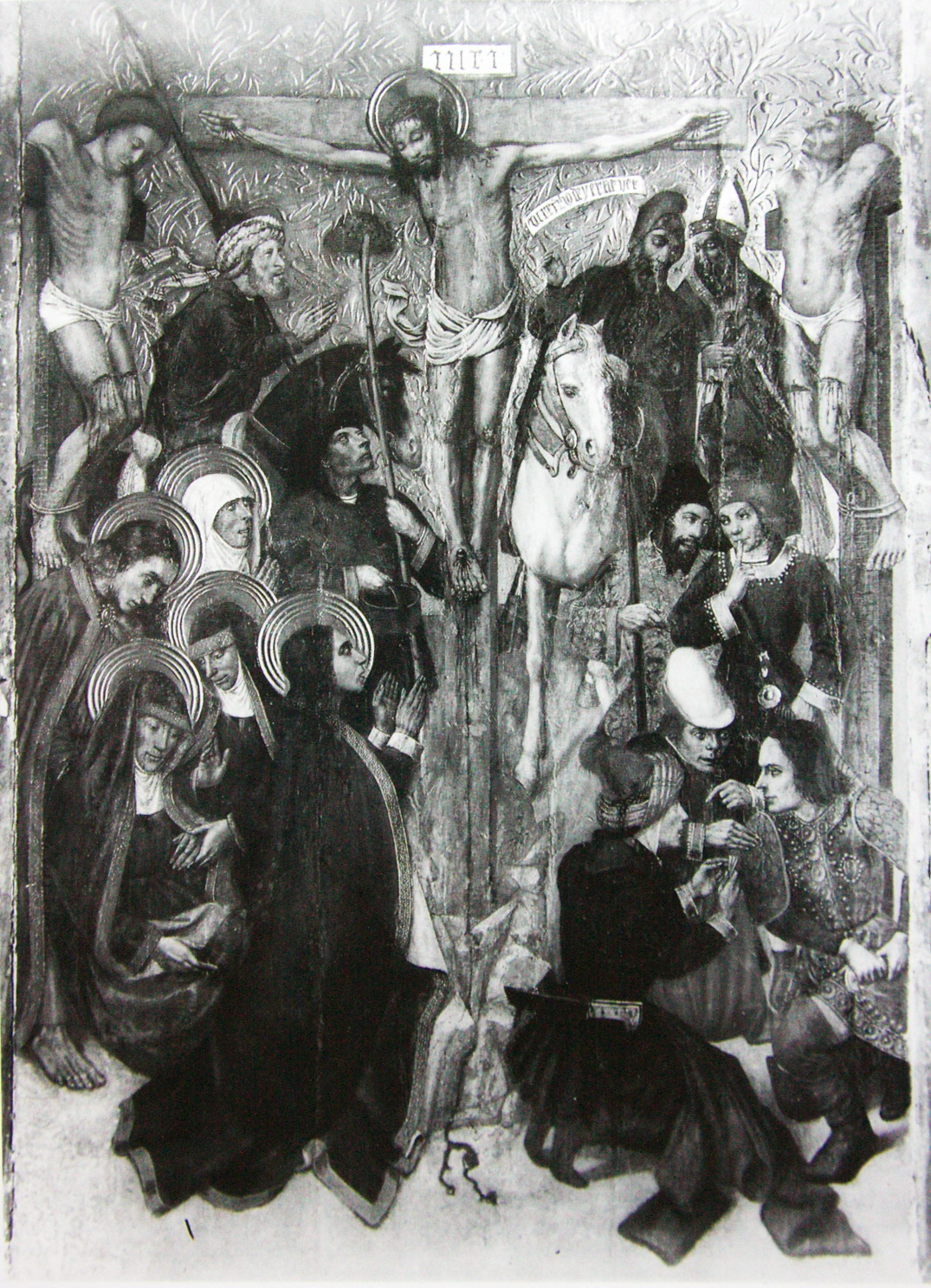 Calvari